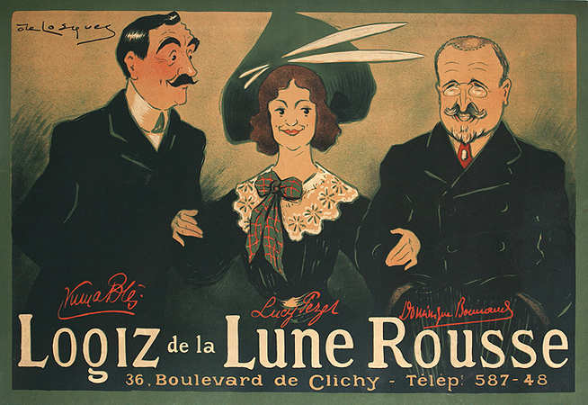 Affiche pour le cabaret Logiz de la Lune rousse. Affiche ancienne, 124 x 85 cm (49 x 33 1/2 inches).